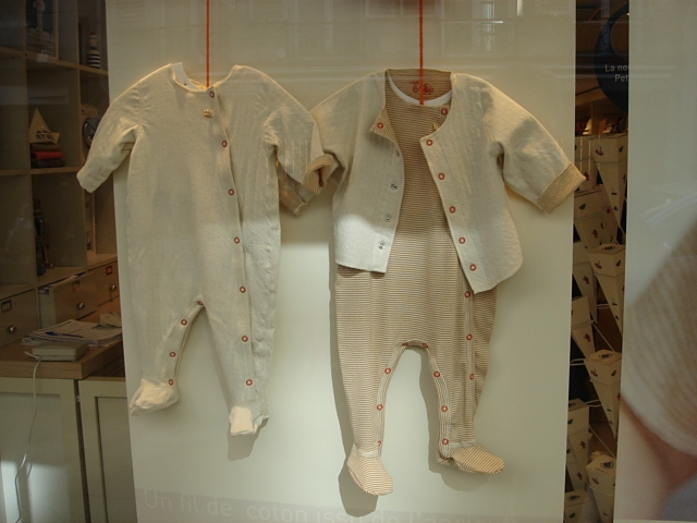 Éléments de costume pour bébé, France, XXIe siècle, présentation dans la devanture d'un magasin.